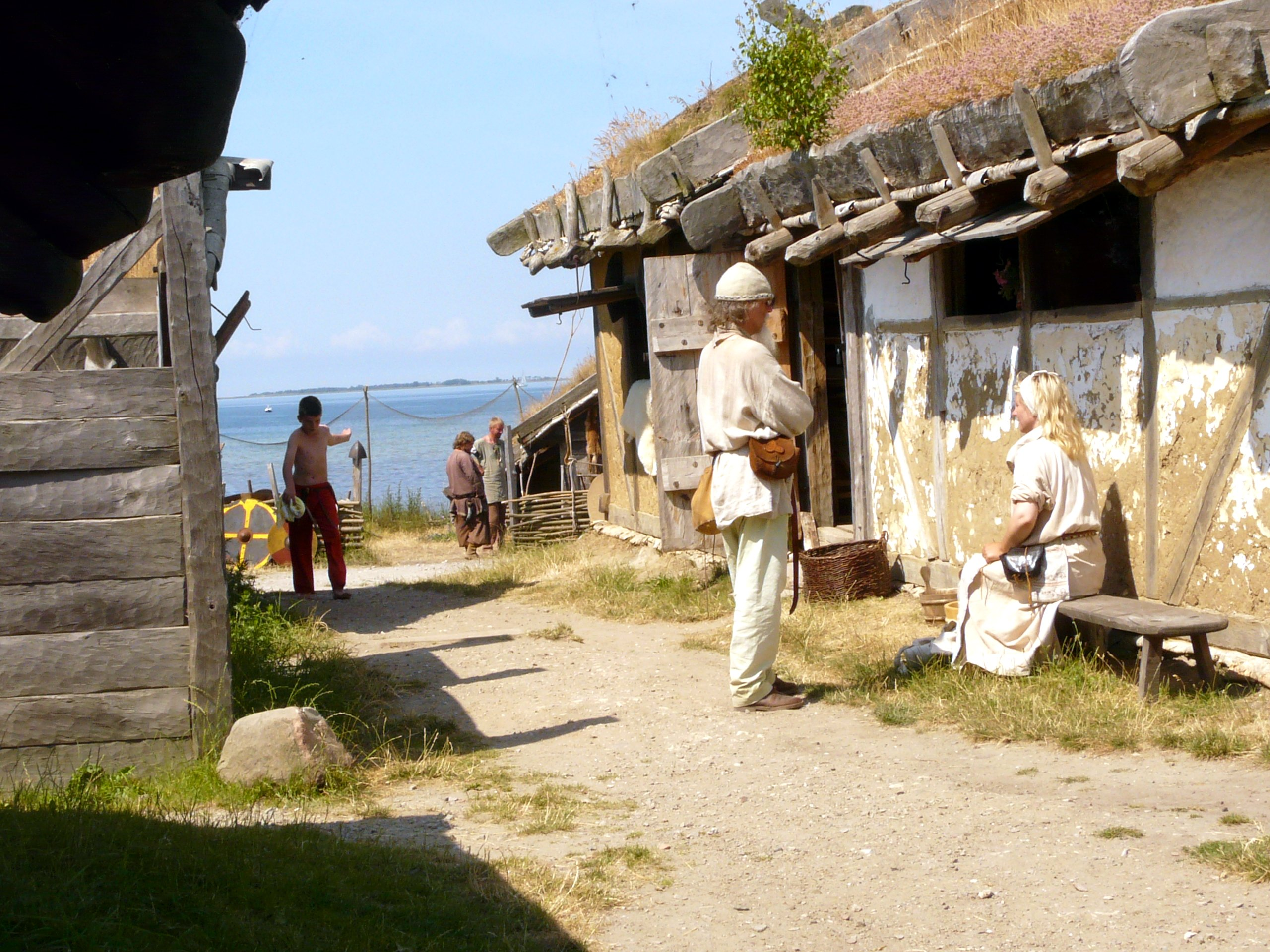 Angestellte "Wikinger" im "Vikingareservat Foteviken" (Höllviken, Schweden)